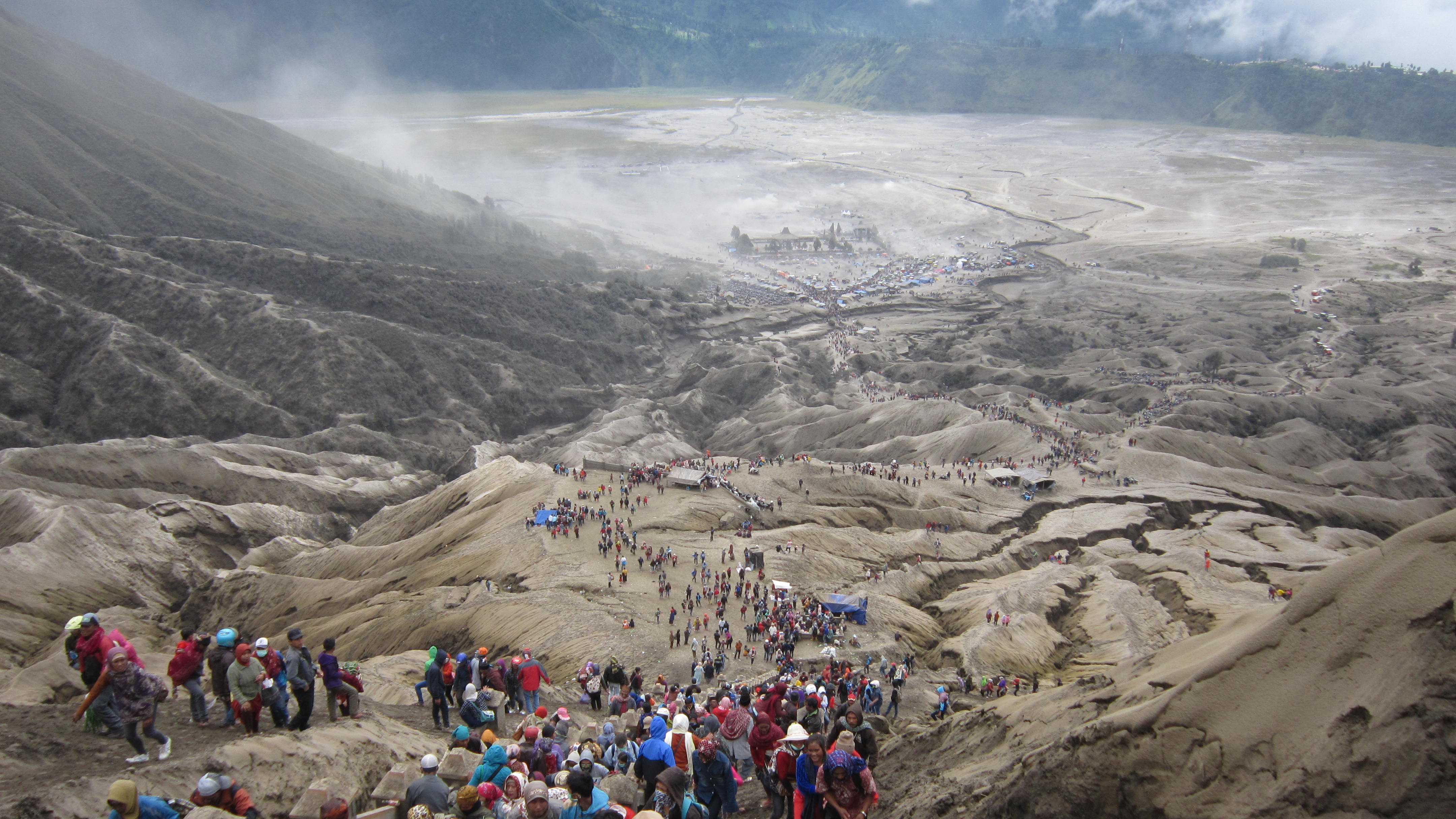 Suasana upacara yadnya kasada di gunung Bromo, Taman Nasional Bromo Tengger Semeru paska erupsi. Walau terjadi perubahan muka bentang alam akibat tumpukan material vulkanik di sekitaran gunung Bromo, warga sekitar tengger dari berbagai daerah seperti Pasuruan, Probolinggo, Malang, dan Lumajang melaksanakan peringatan sejarah tengger dimana pada bulan kasada di penanggalan jawa kuno diperingati sebagai hari dimana anak ke - 25 dari Roro Anteng dan Joko Seger mengorbankan diri dengan masuk ke dalam kawah bromo. nama tengger sendiri diambil dari terminasi nama Roro anteng (teng) dan Joko Seger (ger). Sementara nama gunung Bromo sendiri berasal dari penyerapan kata Brahma (Mbah Brama), yang pada saat pemujaan oleh Roro Anteng dan Joko Seger untuk meminta keturunan Mbah Brahma lah yang memberikan 25 orang keturunan. Gunung Bromo sendiri merupakan salah satu gunung vulkanik aktif di pulau jawa. Gunung ini termasuk kedalam golongan gunung muda dimana dikelilingi oleh kaldera luas. Gunung Bromo berada di kabupaten Probolinggo dan termasuk salah satu jajaran gunung di Taman Nasional Bromo Tengger Semeru.